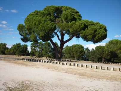 Fotografía del "Pino de Nuestra Señora" que está al lado de la ermita de Nuestra Señora del Pinarejo en Aldeanueva del Codonal (Segovia)